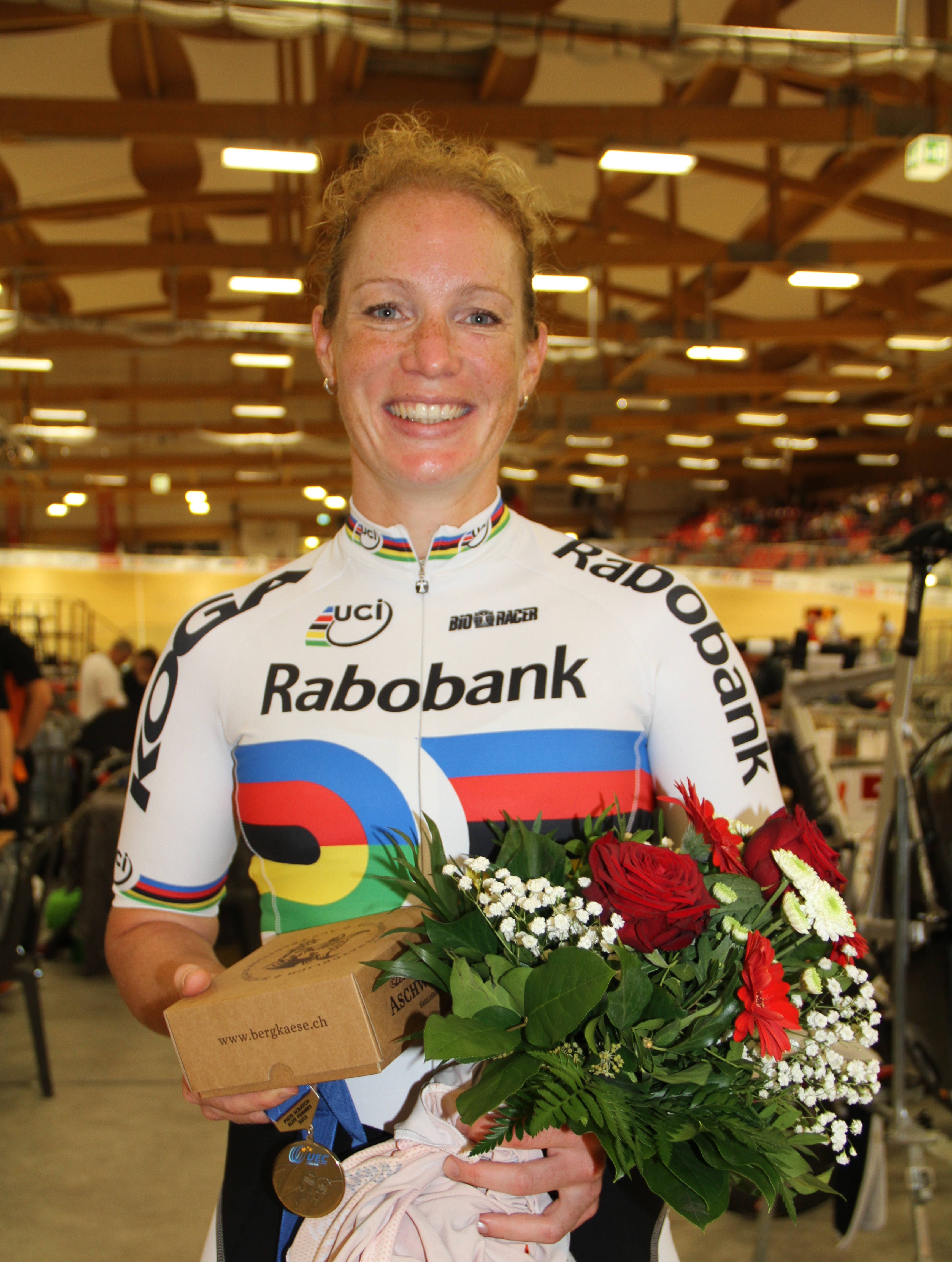 Kirsten Wild, Silber im Scratch The making of this document was supported by the Community-Budget of Wikimedia Germany.